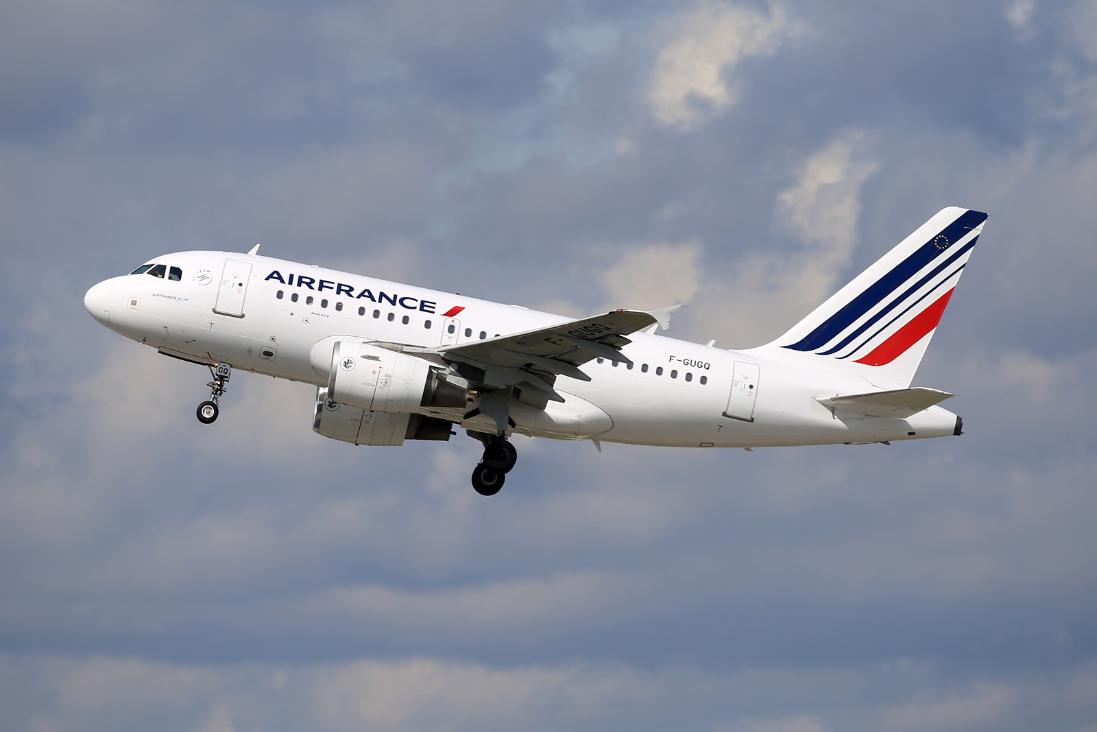 Zürich 14.4.2016